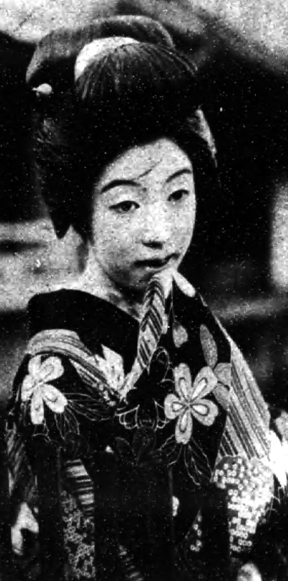 岡島 艶子（おかじま つやこ、1909年〈明治42年〉1月9日 - 1989年〈平成元年）〉2月4日）は、日本の女優である。 (Tsuyako Okashima, 1909-1989. Actress from Japan.)